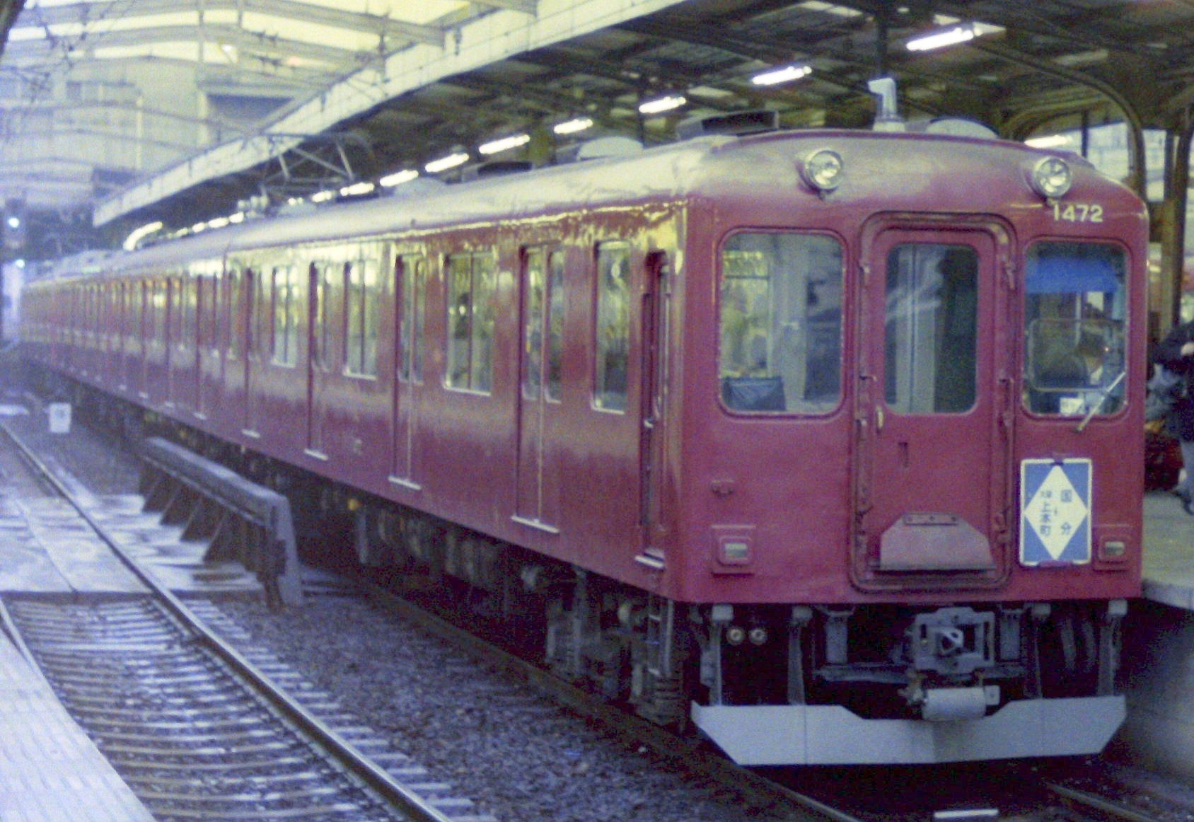 近鉄1470系 1985年ごろ 鶴橋にて